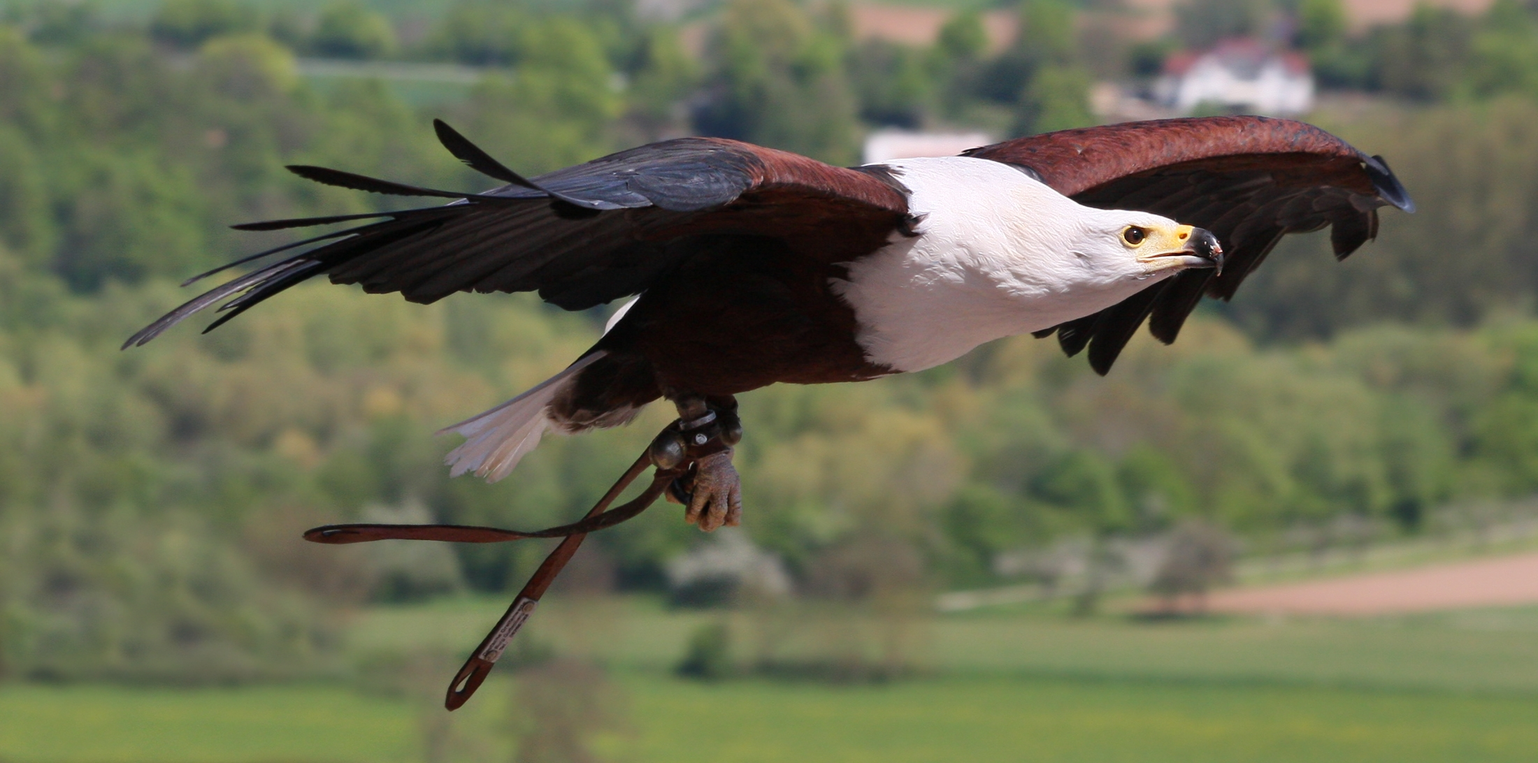 Haliaeetus vocifer